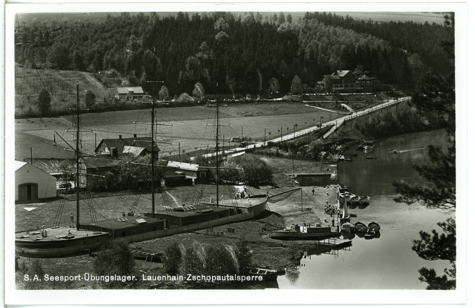 Lauenhain; Zschopau-Talsperre - Seesport Übungslager This postcard is from publisher Brück & Sohn in Meißen ( postcard has a unique number 27255 and is available in a higher resolution at the publisher. This images was uploaded in a cooperation project between Wikipedians and the publisher.